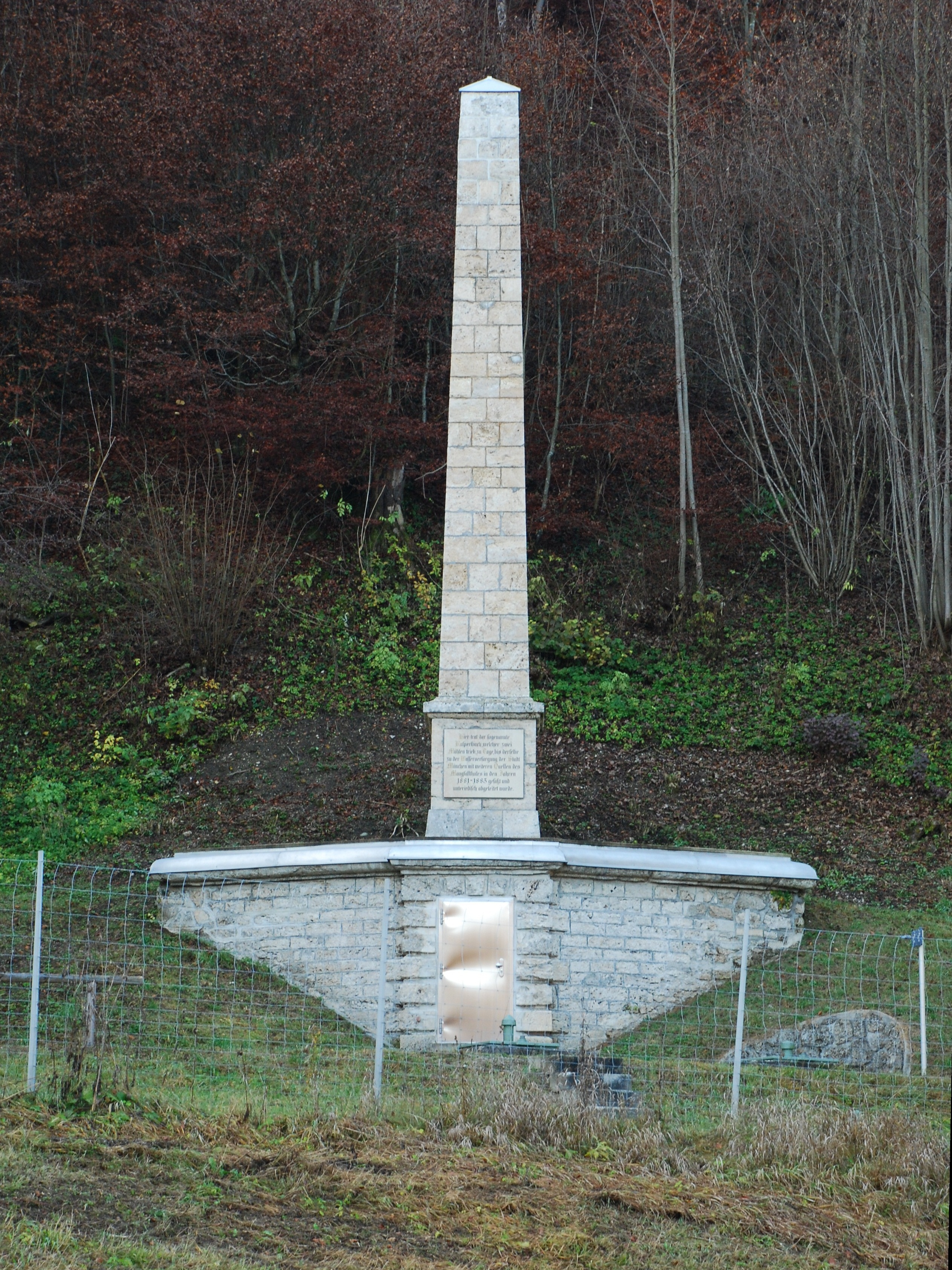 Obelisk in Mühlthal, Gemeinde Valley, Landkreis Miesbach, Regierungsbezirk Oberbayern, Bayern. Errichtet zur Erinnerung an den Bau der Münchener Wasserversorgung 1881/1883. Als Baudenkmal unter Aktennummer D-1-82-133-32 in der Bayerischen Denkmalliste aufgeführt.